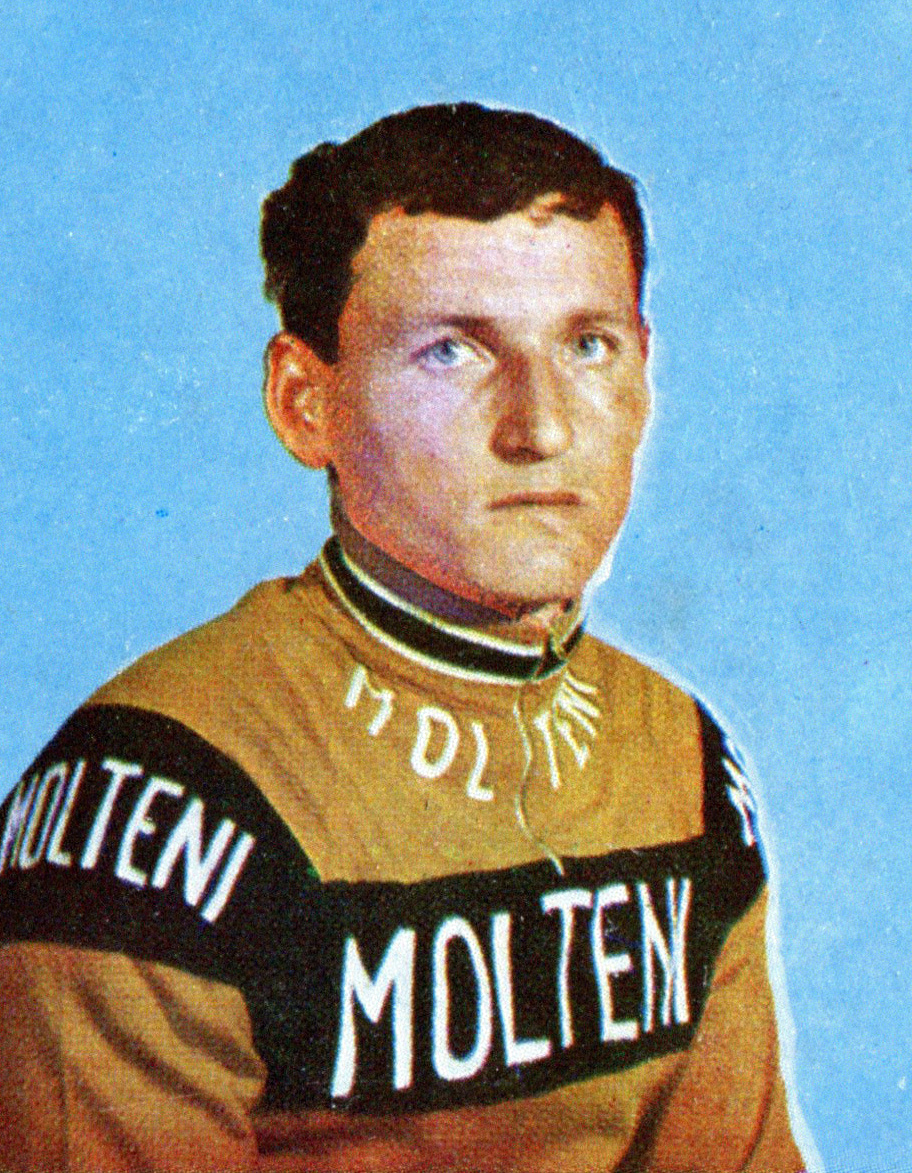 CAMPIONI DELLO SPORT 1966/67 - Figurina/Sticker n. 193 - G. DE ROSSO